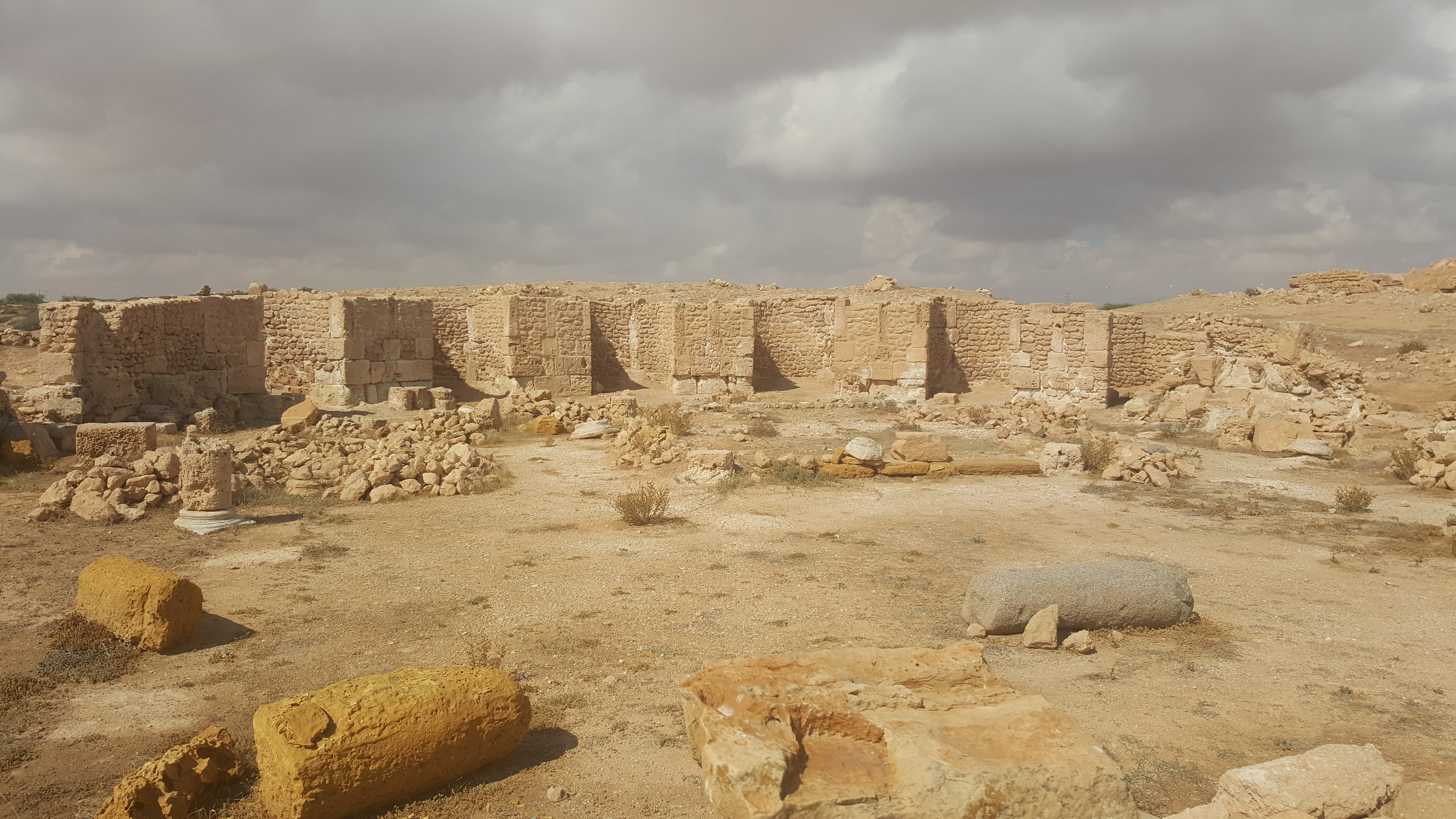 Marché (Macellum)